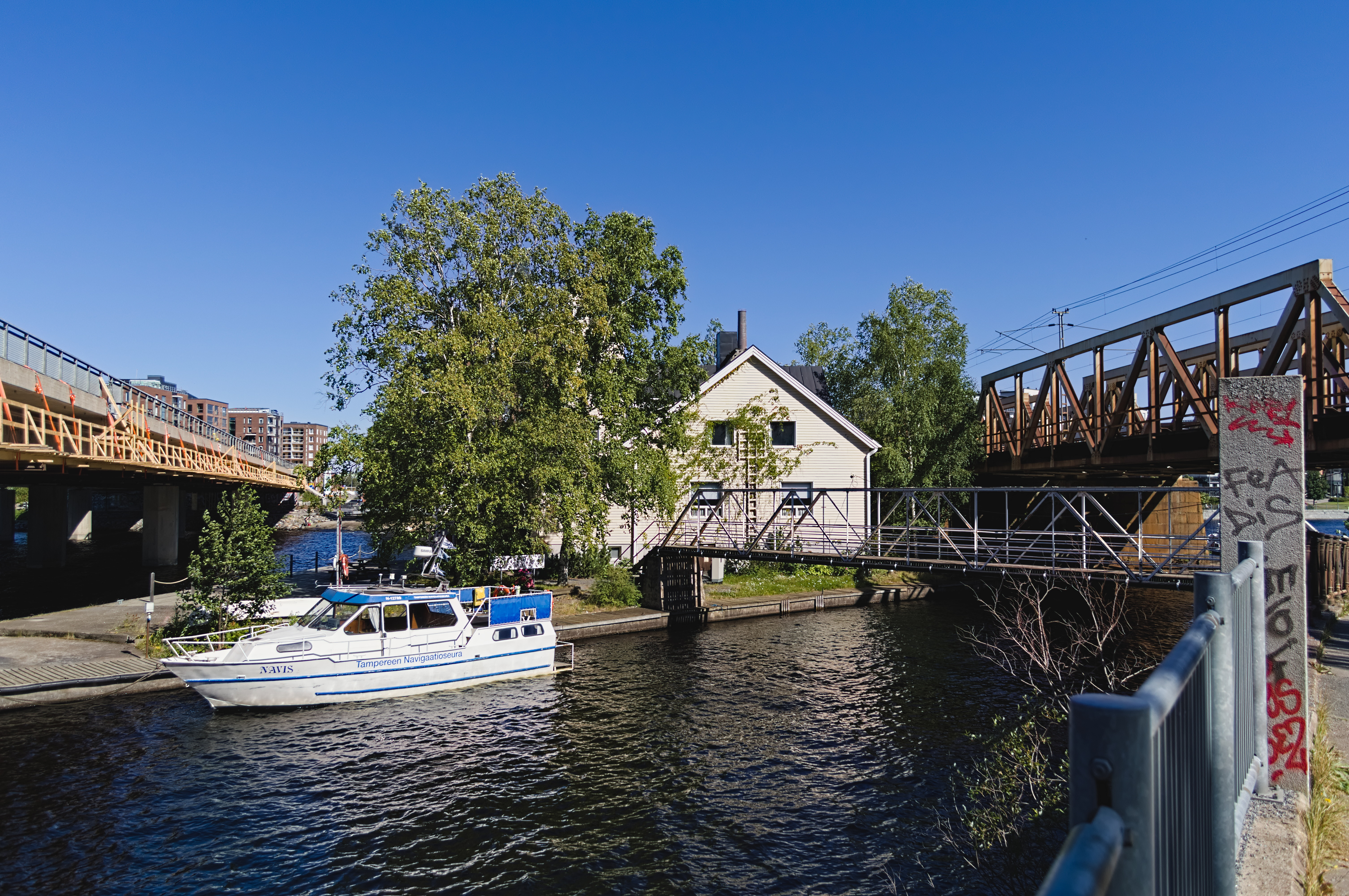 Tampereen Pajasaari Tammerkosken niskalla. Saari on Näsinsillan ja rautatiesillan välissä. Purjehdusseuran paviljonki on Birger Federleyn suunnittelema.